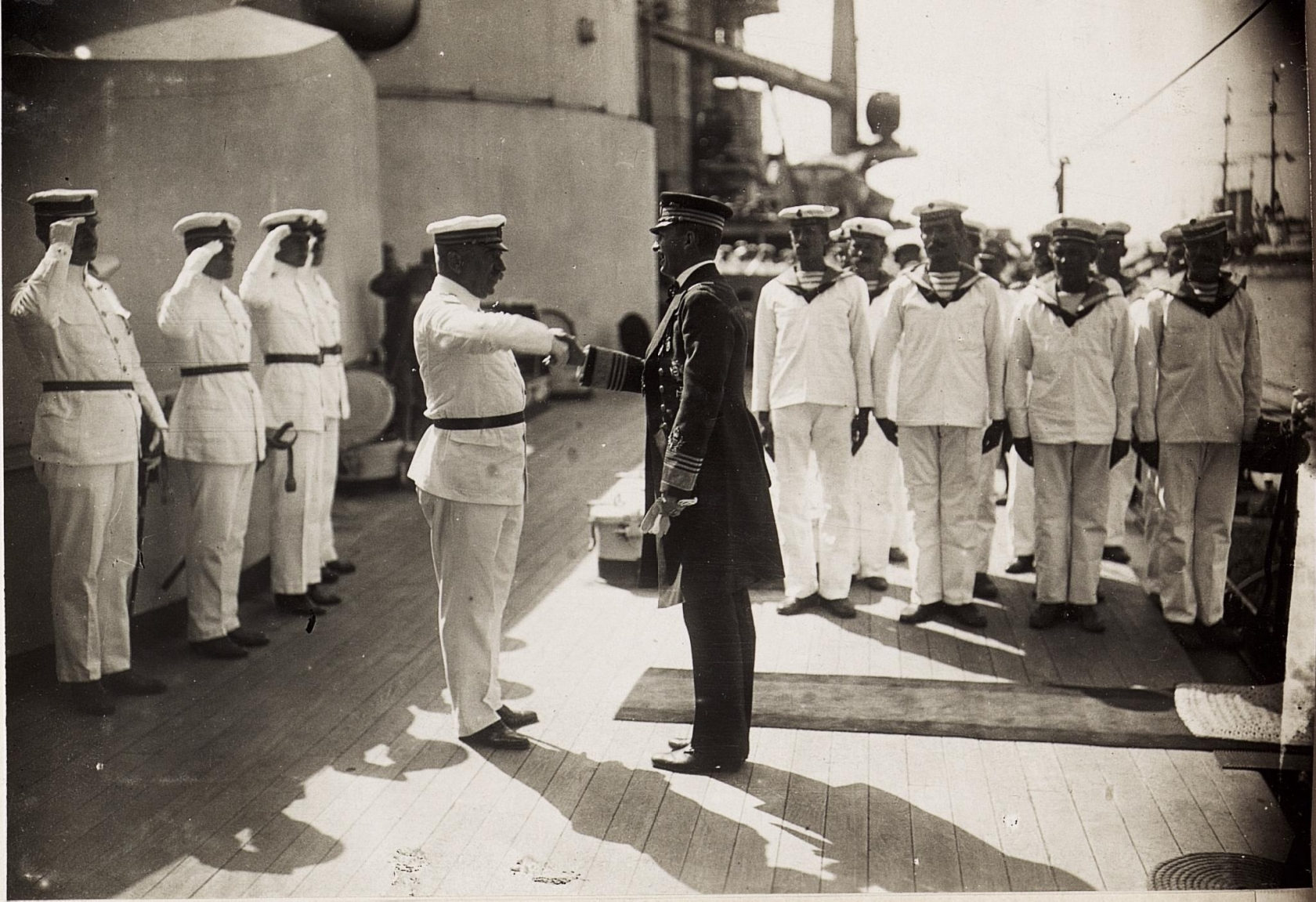 Kaiser Karl I. besichtigt Marineeinheiten in Pola, hier an Bord der Viribus Unitis